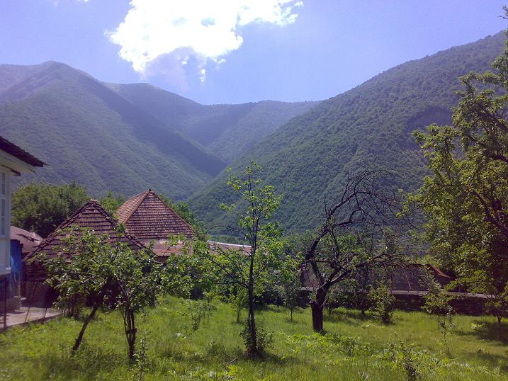 Киш(Шеки)